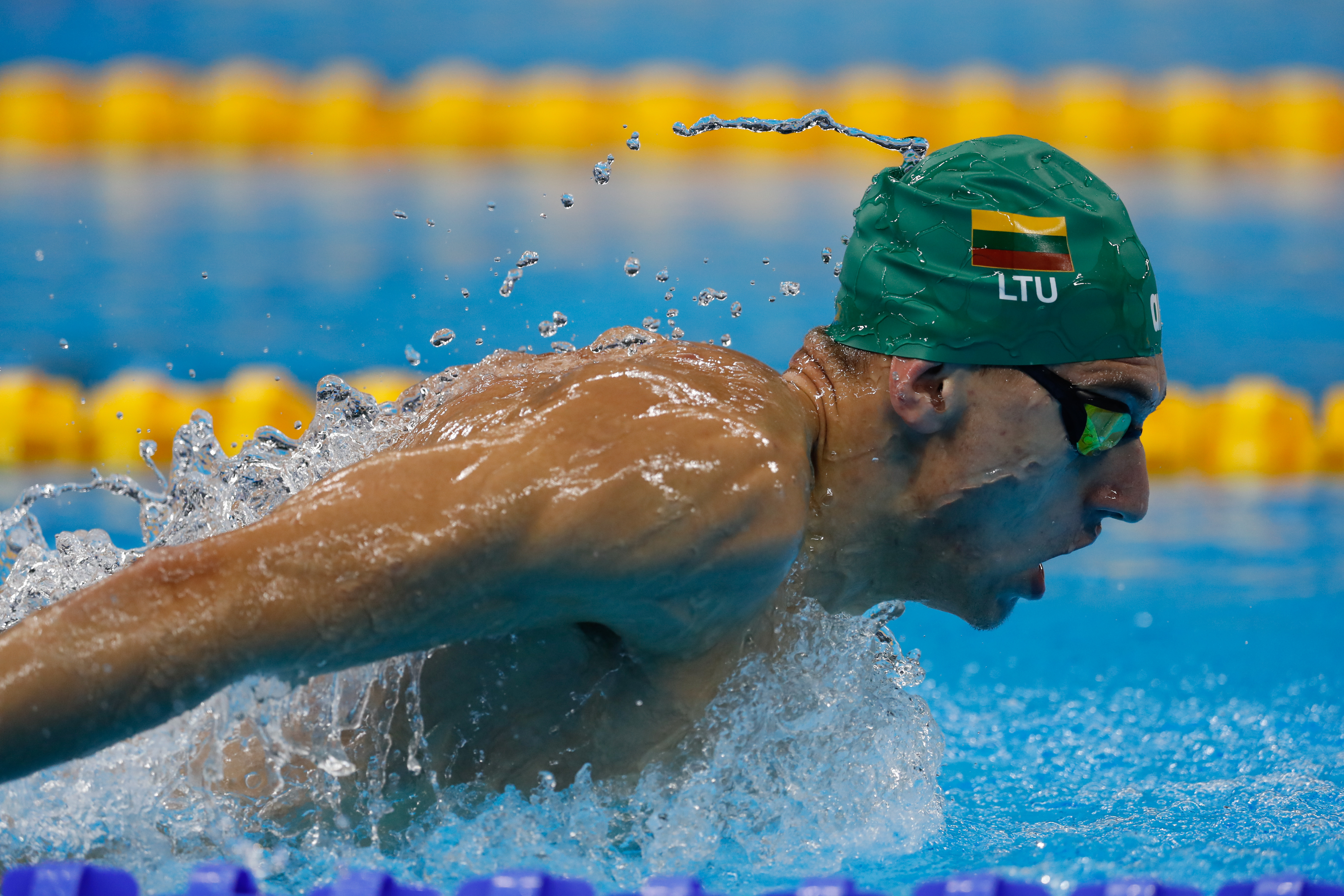 Rio de Janeiro - Atletas equipe de natação da Lituânia treinam na piscina do Estádio Aquático, no Parque Olímpico da Barra da Tijuca (Fernando Frazão/Agência Brasil)